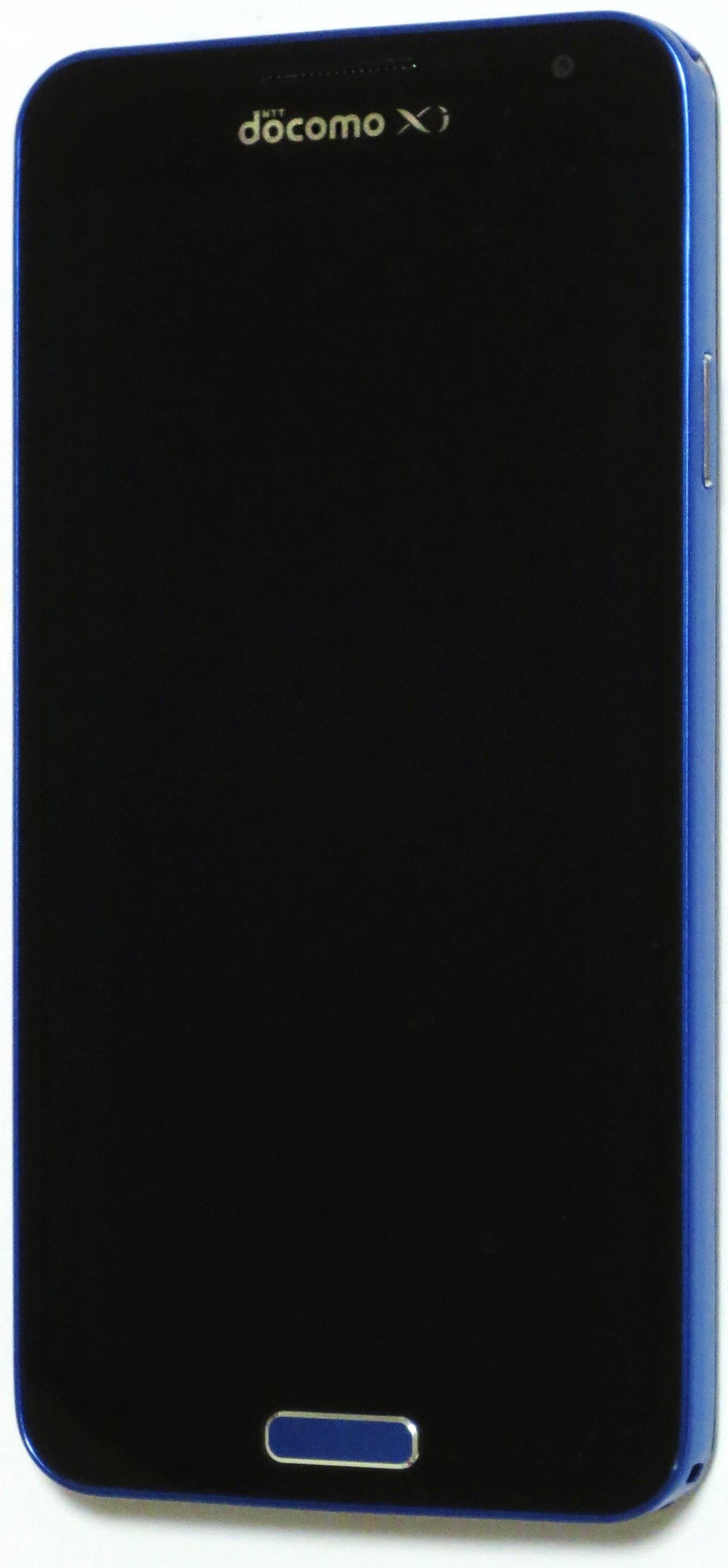 Samsung Galaxy J